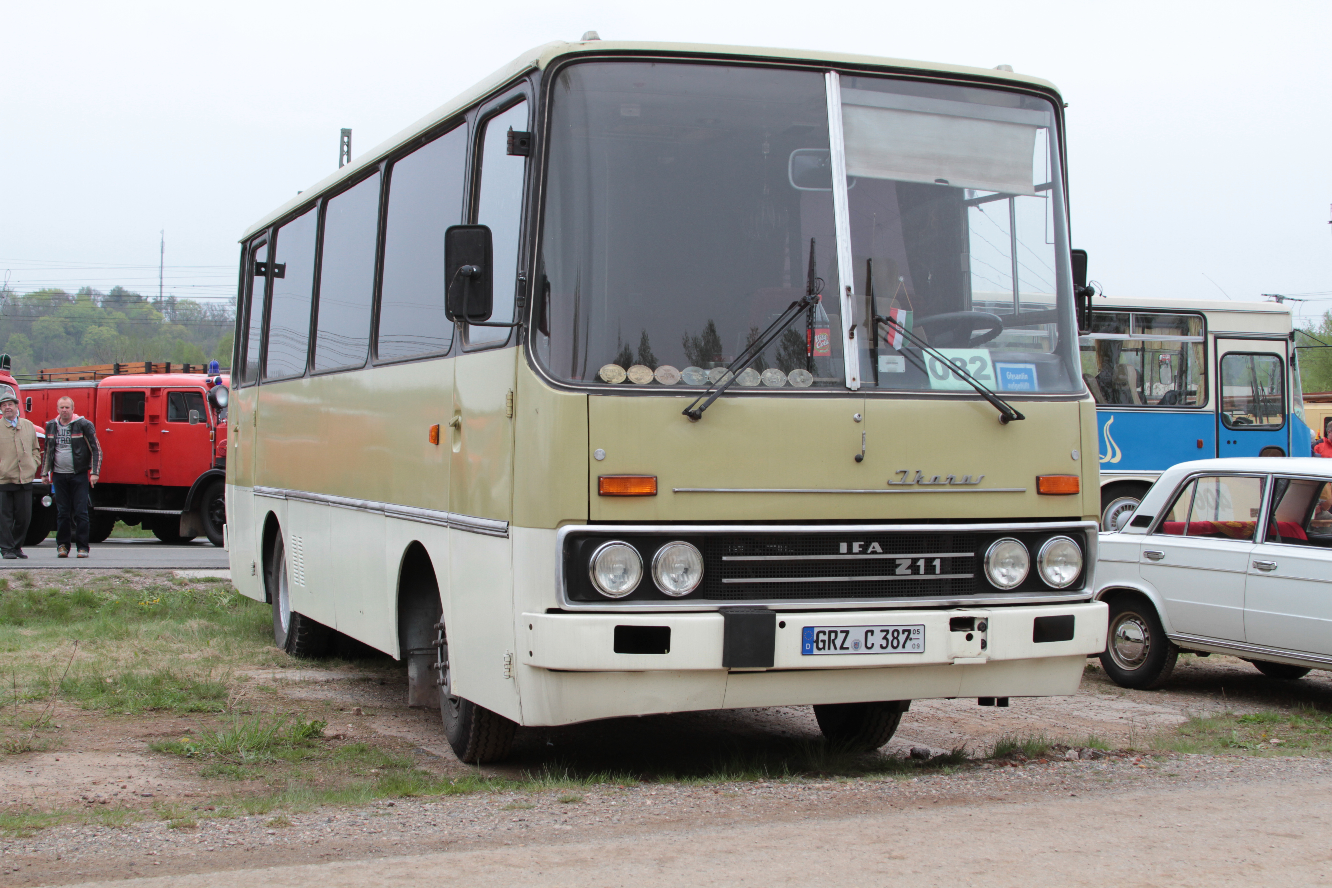 Ikarus 211 auf dem 16. IFA Oldtimertreffen Werdau 2013